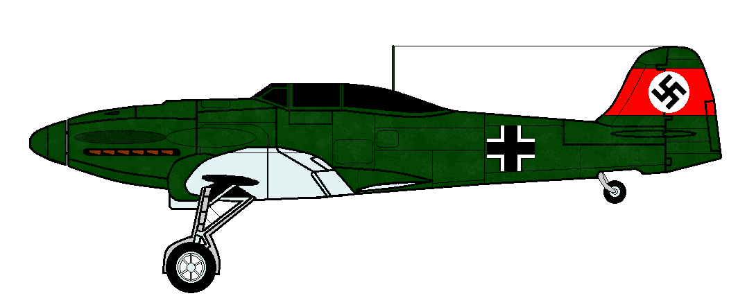 Heinkel He 112 in der Luftwaffenausführung 1938